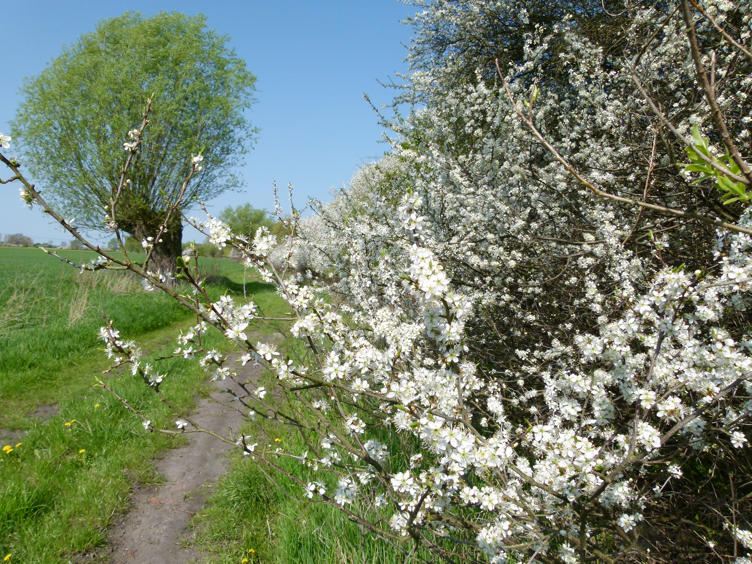 Kopfweide und blühende Hecke im Naturschutzgebiet „Aland-Elbe-Niederung“ (NSG Nr. 388), Sachsen-Anhalt